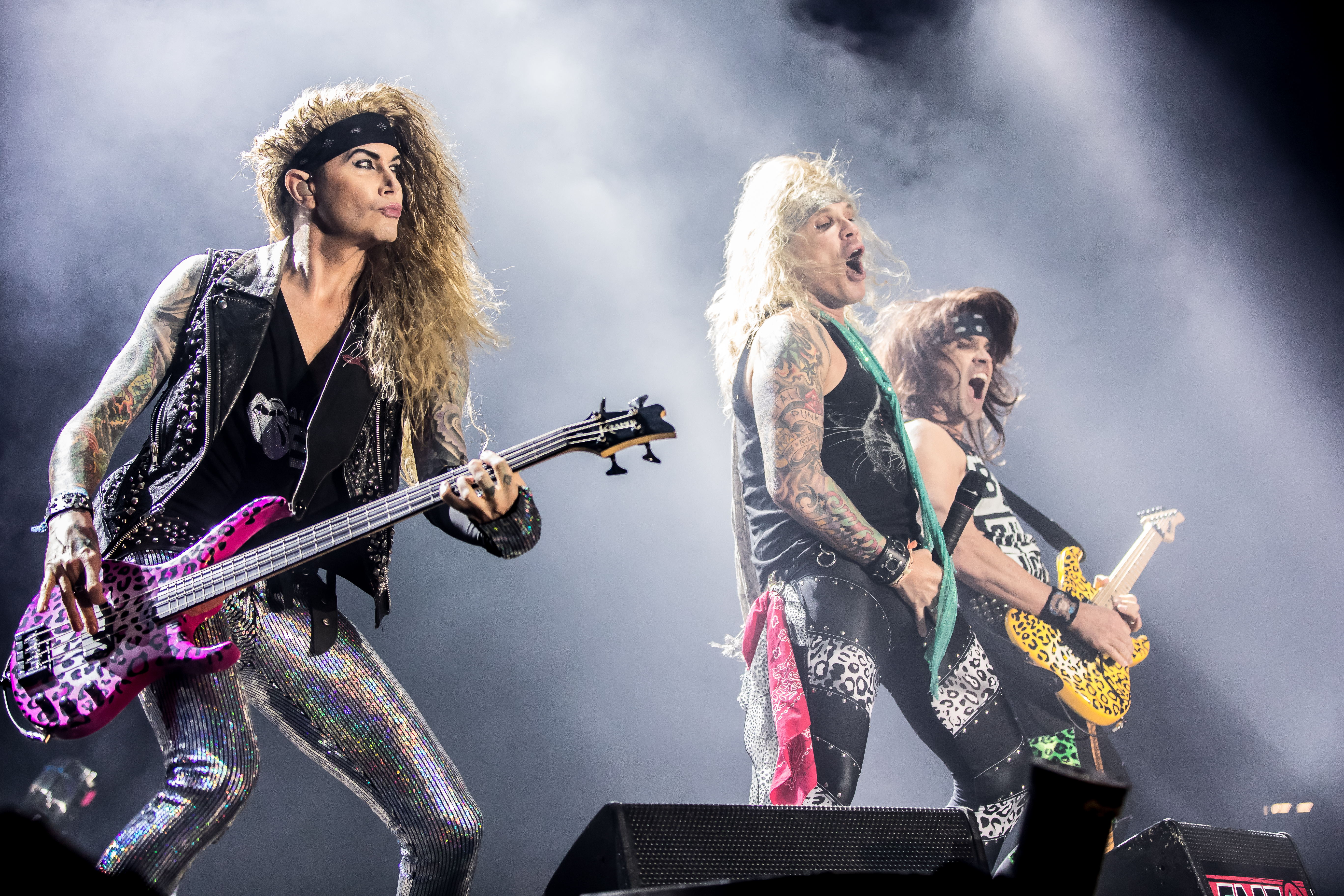 Steel Panther during Summer Breeze 2016 at , Dinkelsbühl, Bayern, Germany on 2016-08-20, Photo: Sven Mandel